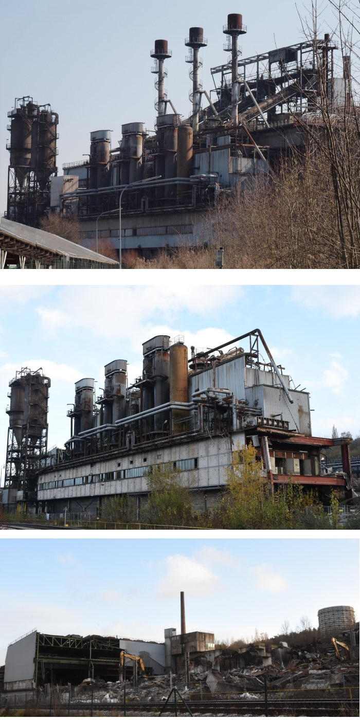 Maxhuette Stahlwerk Abriss 2019